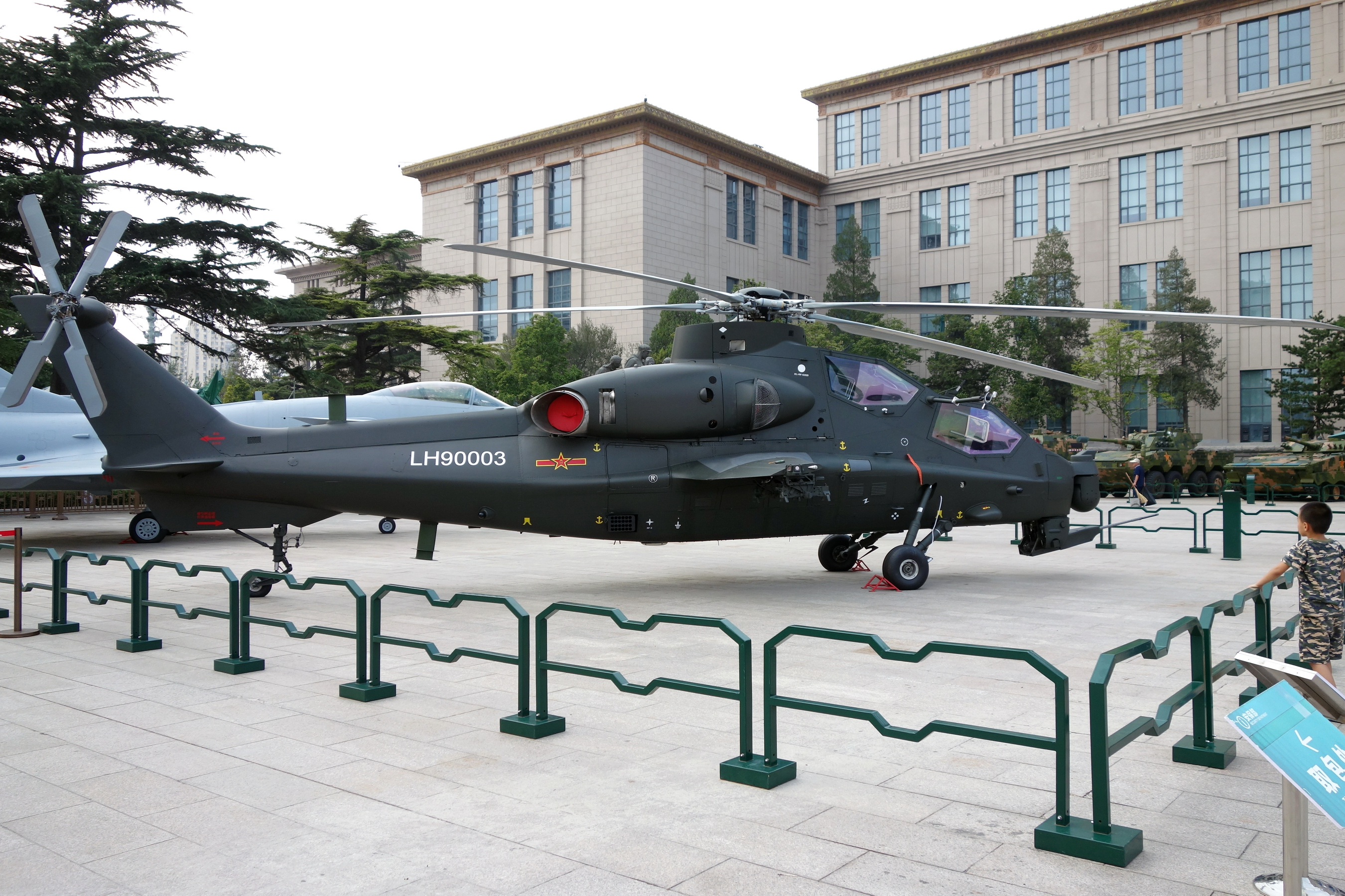 中国人民革命军事博物馆纪念中国人民解放军建军90周年主题展览展出的直-10“霹雳火”武装直升机。